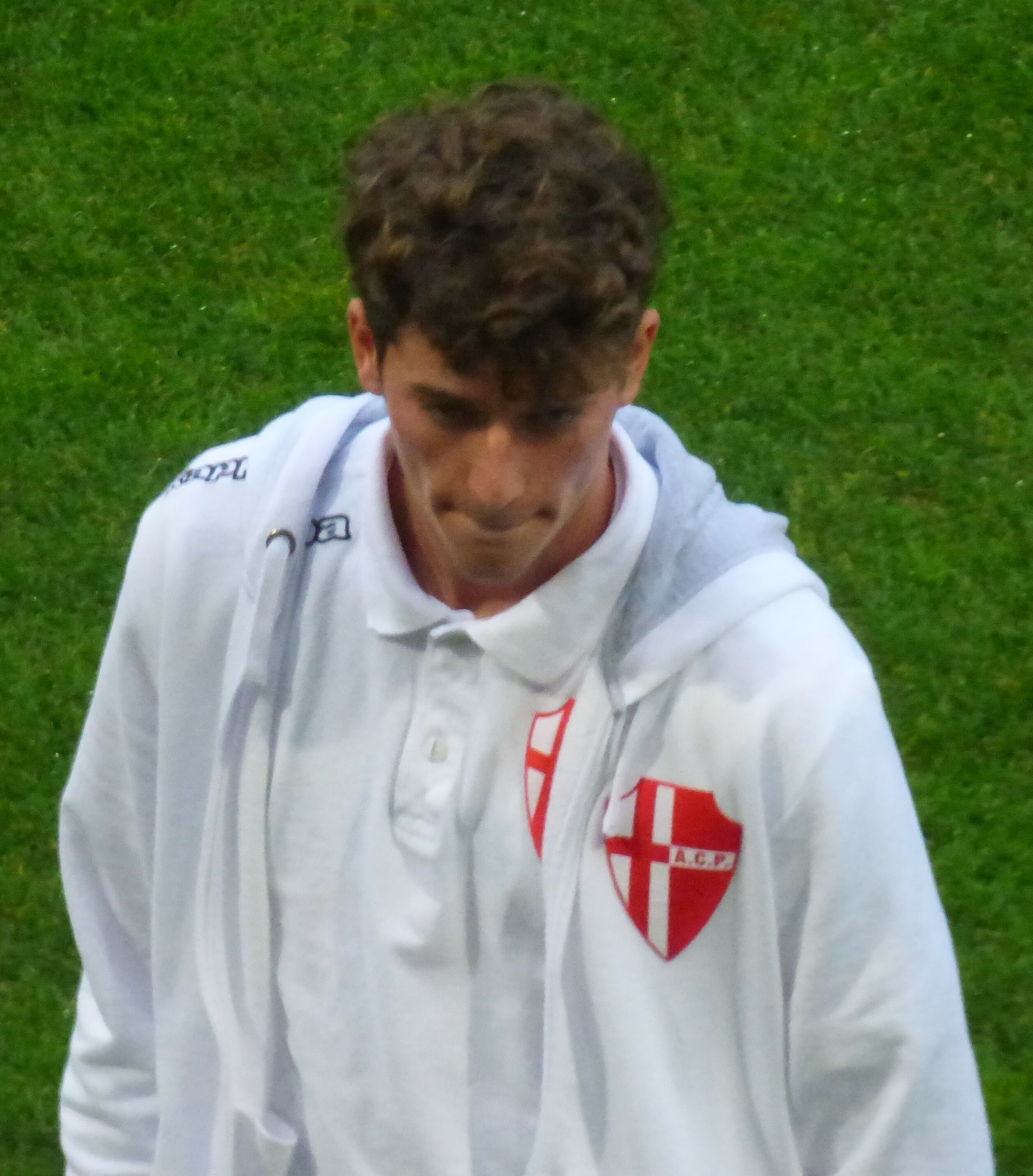 Andrea Cisco lors du match amical RC Lens - Calcio Padova, le 11 octobre 2018 au Stade Bollaert-Delelis de Lens.